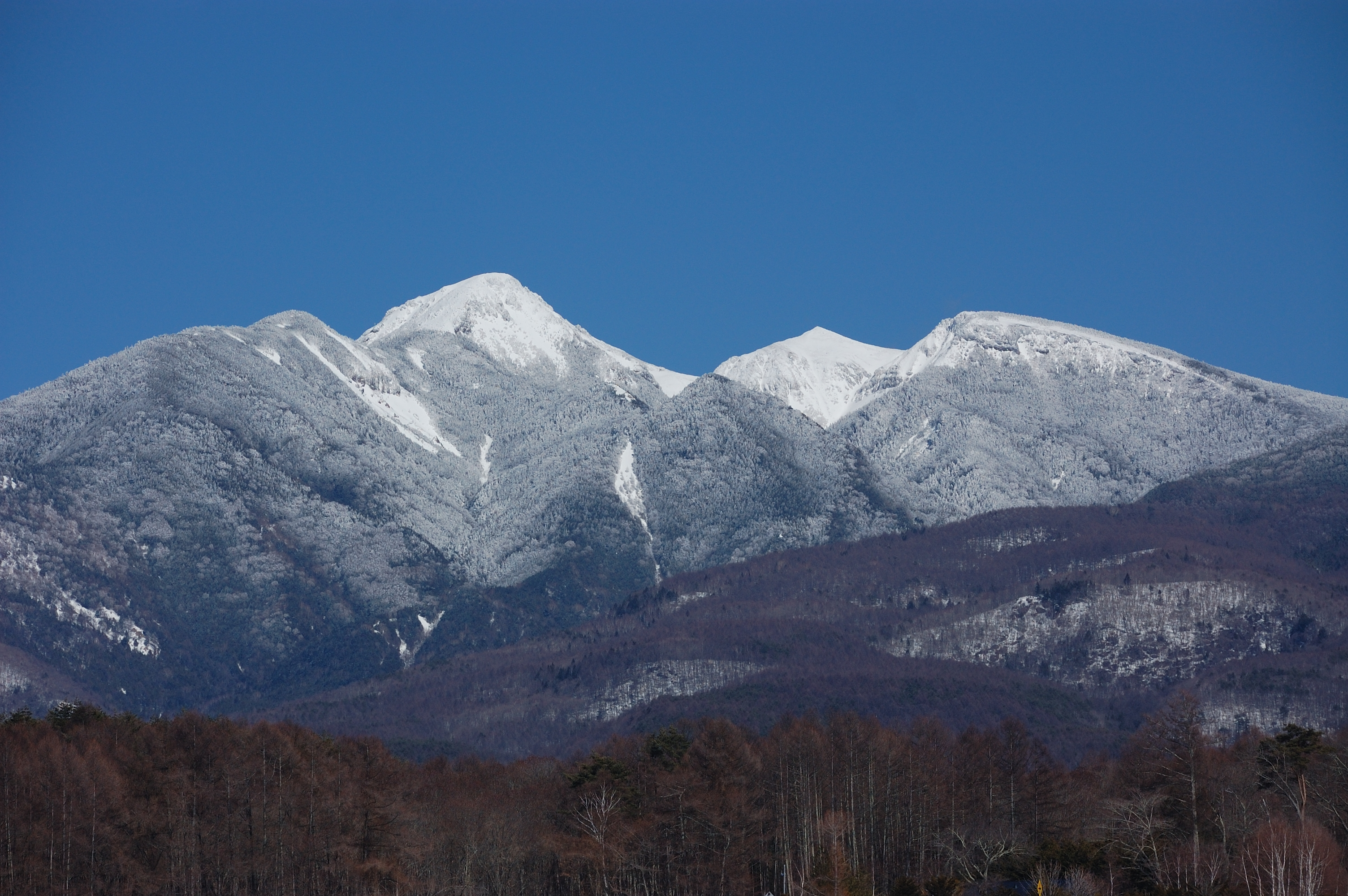 八ヶ岳 天狗岳